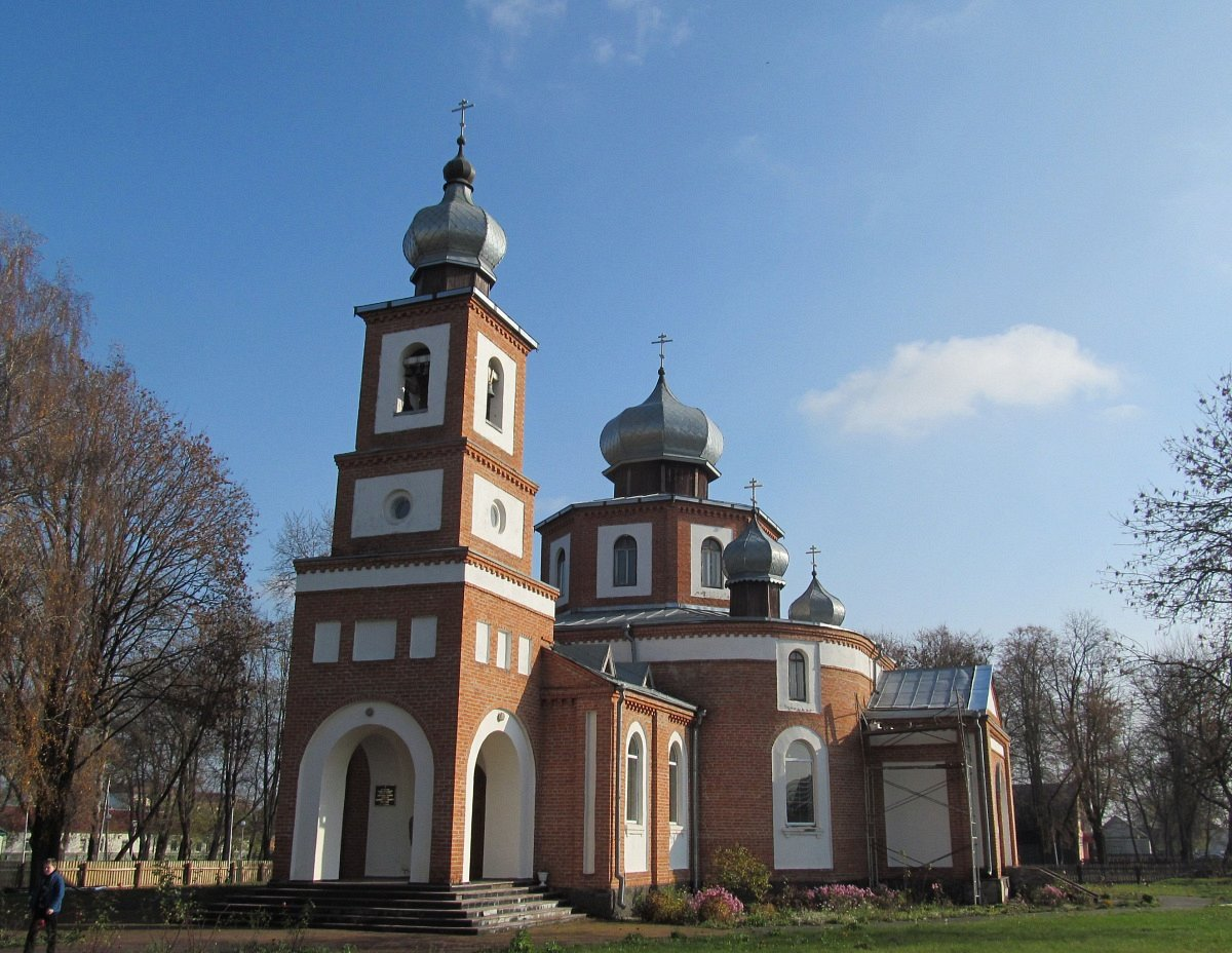 Лельчыцы. Царква Святой Тройцы